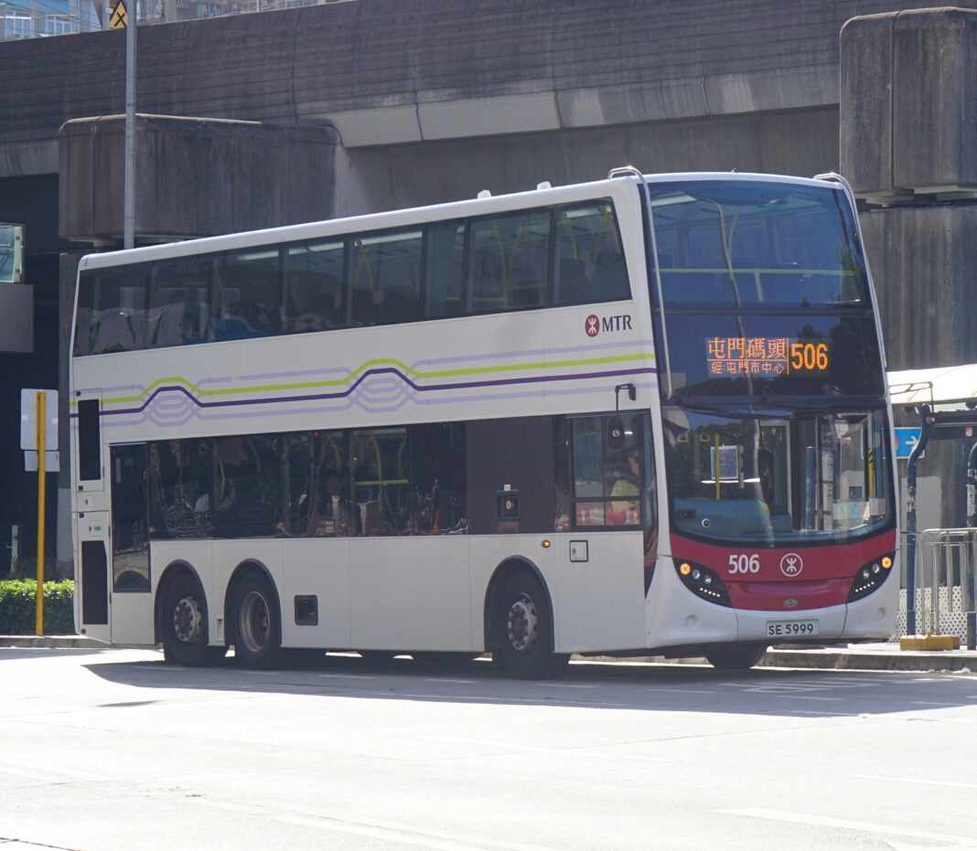 中文（香港）: 正在屯門站上落客的港鐵巴士506線